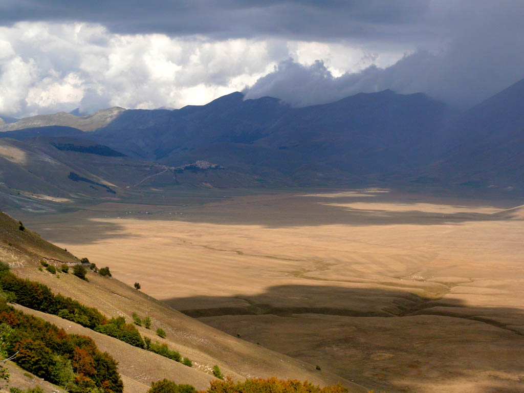 Piano Castellucio